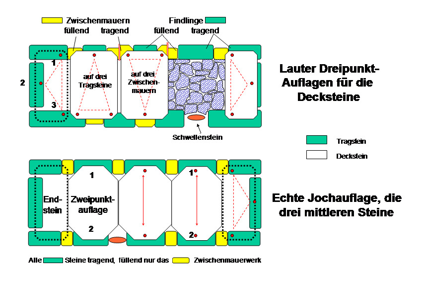 Deckenbau